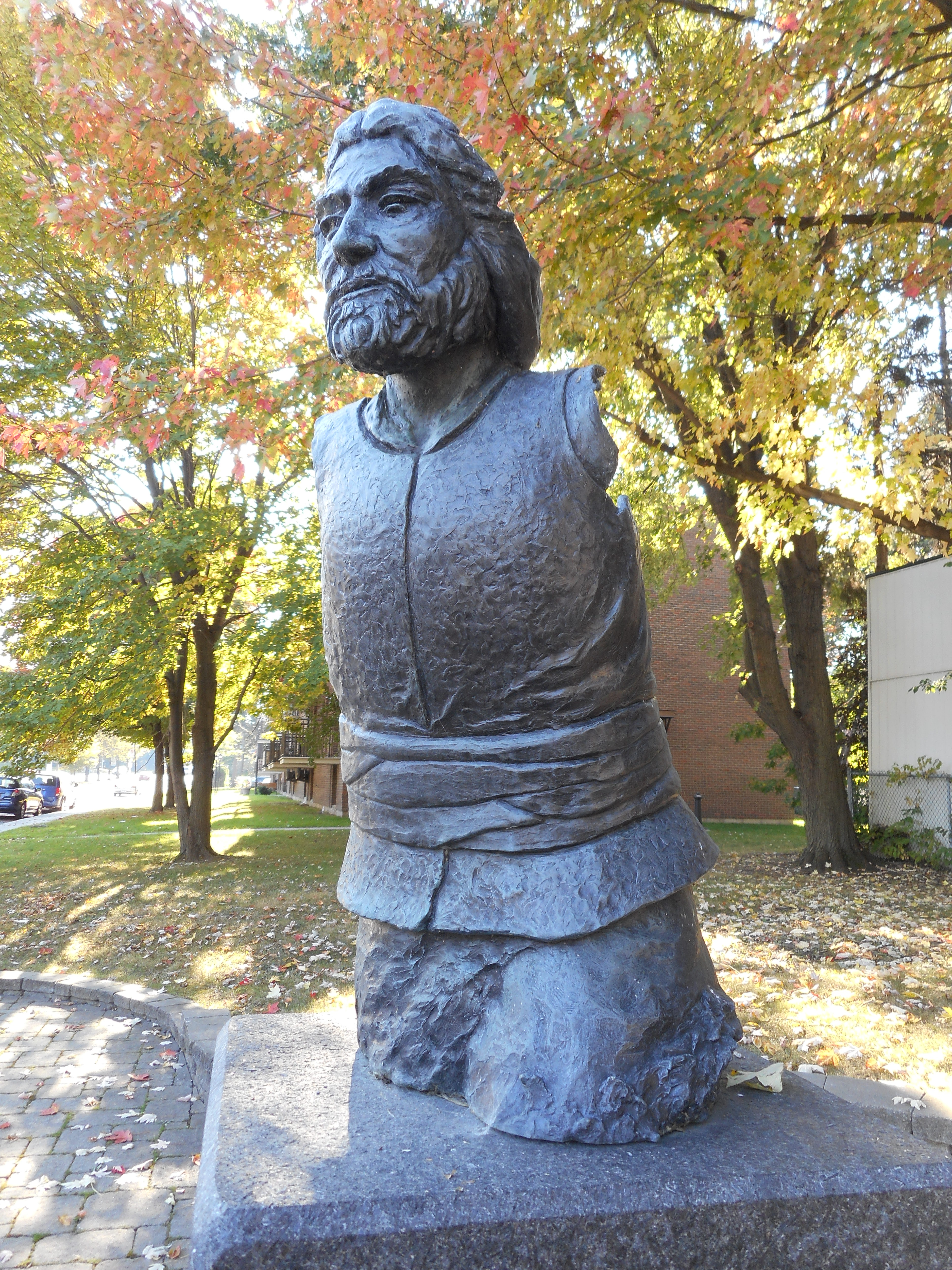 Le monument de Charles Le Moyne, réalisé par Luc Laramée, a été inauguré le 30 septembre 2001. Il est situé à l'ouest du chemin de Chambly, à l'intersection de la rue Sainte-Élizabeth. Il relève d'une initiative de la Société historique et culturelle du Marigot. marigot.ca